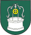 Wappen der Gemeinde Burgau